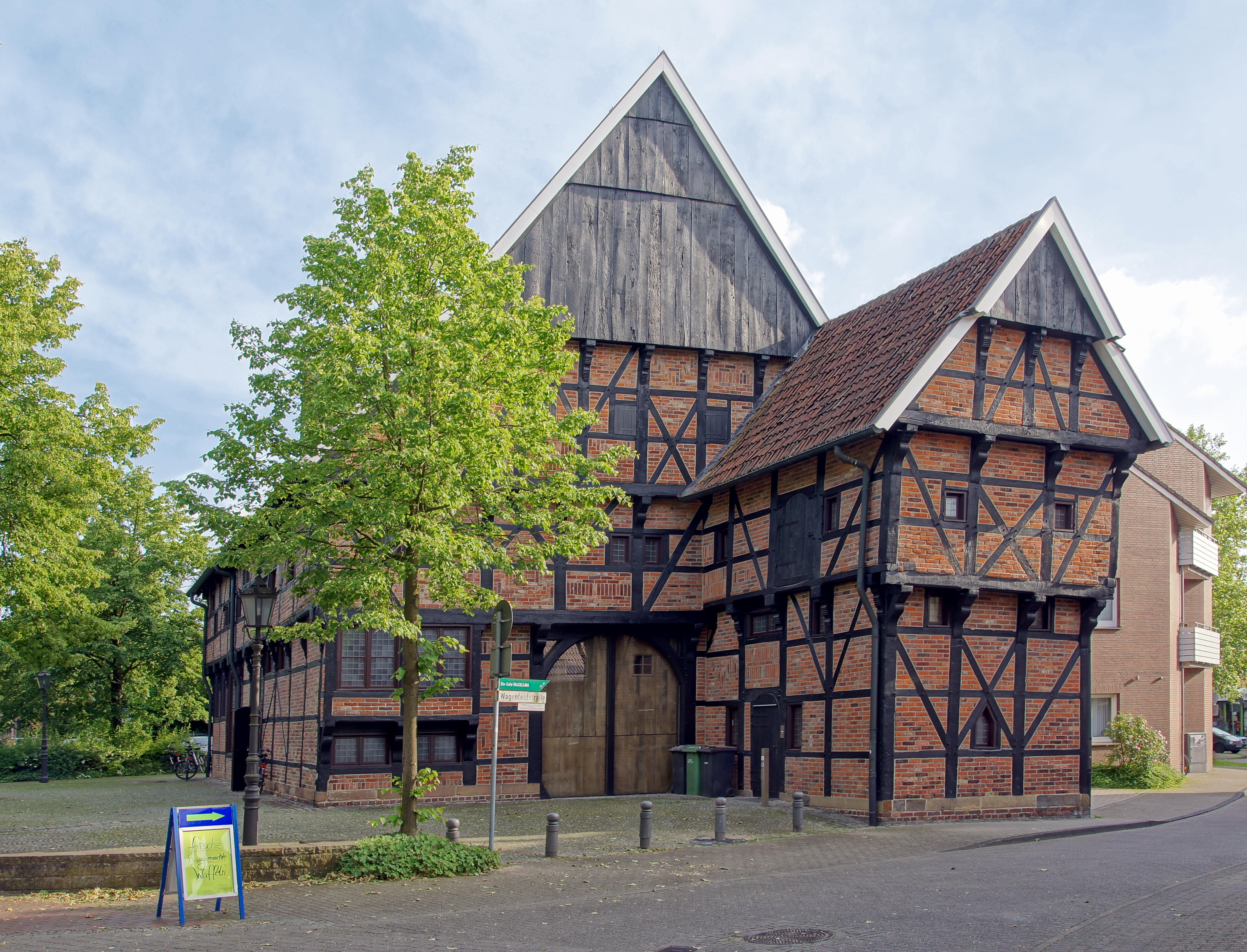 Die Alte Post ist ein Fachwerkbürgerhaus in der Mühlenstraße 15 in Drensteinfurt. Es wurde im Jahr 1647 errichtet. Ursprünglich diente es zu Wohn- und Lagerzwecken sowie als Getreidespeicher. Später, von 1850 bis 1917, war im Gebäude eine Poststation untergebracht, von der sich seine heutige Bezeichnung ableitet. 1976 erwarb die Stadt das im Verfall begriffene Haus und sanierte es aufwändig. Heute wird es u.a. für Ratssitzungen, Hochzeiten und kulturelle Veranstaltungen genutzt. Am 28. Juni 1982 wurde es in die Denkmalliste der Stadt Drensteinfurt eingetragen. This is a photograph of an architectural monument.It is on the list of cultural monuments of Drensteinfurt